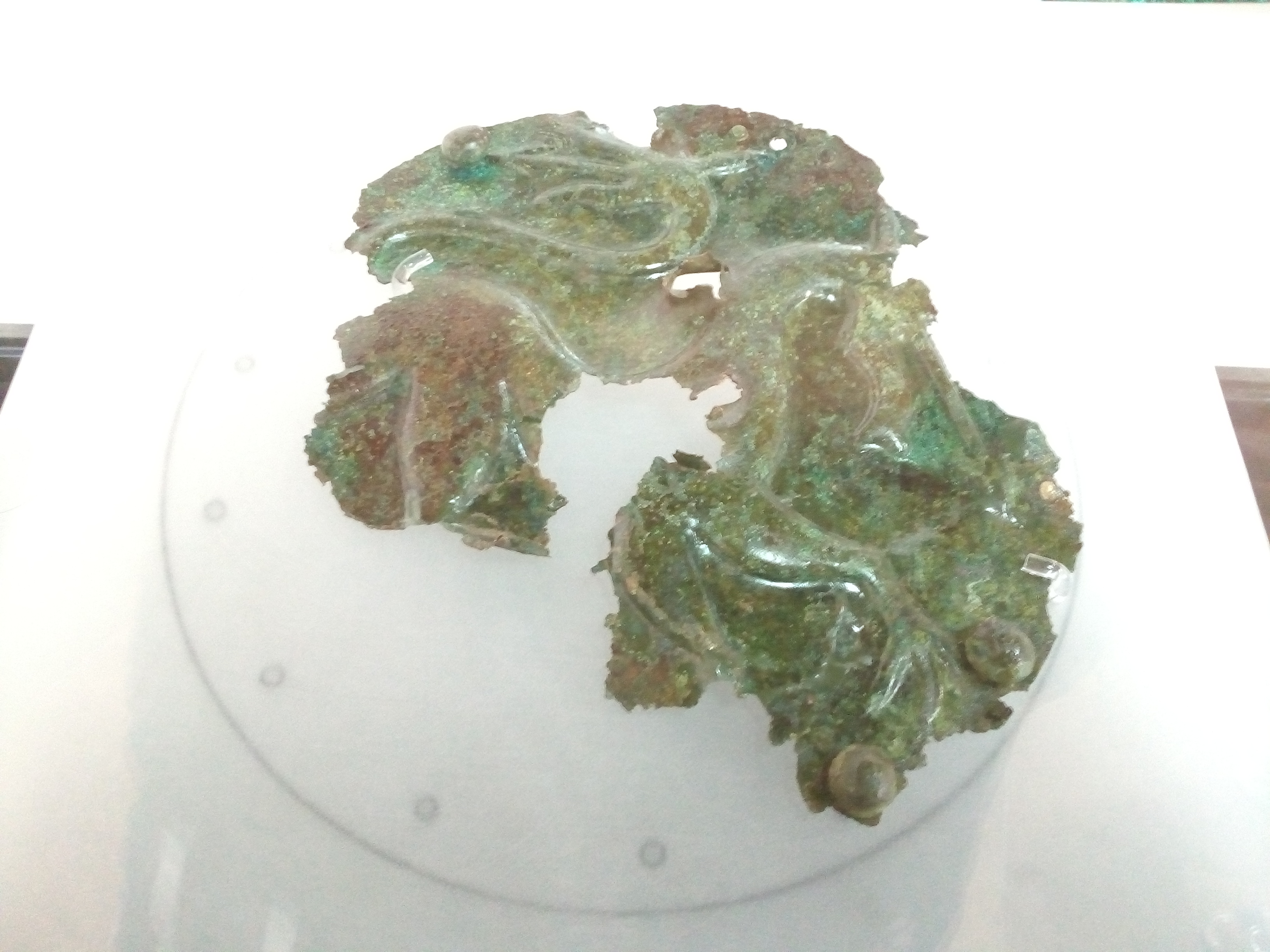 La cosiddetta "Chimera dei Marsi"